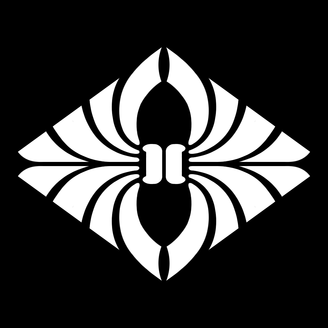 「熨斗菱」紋（染抜）